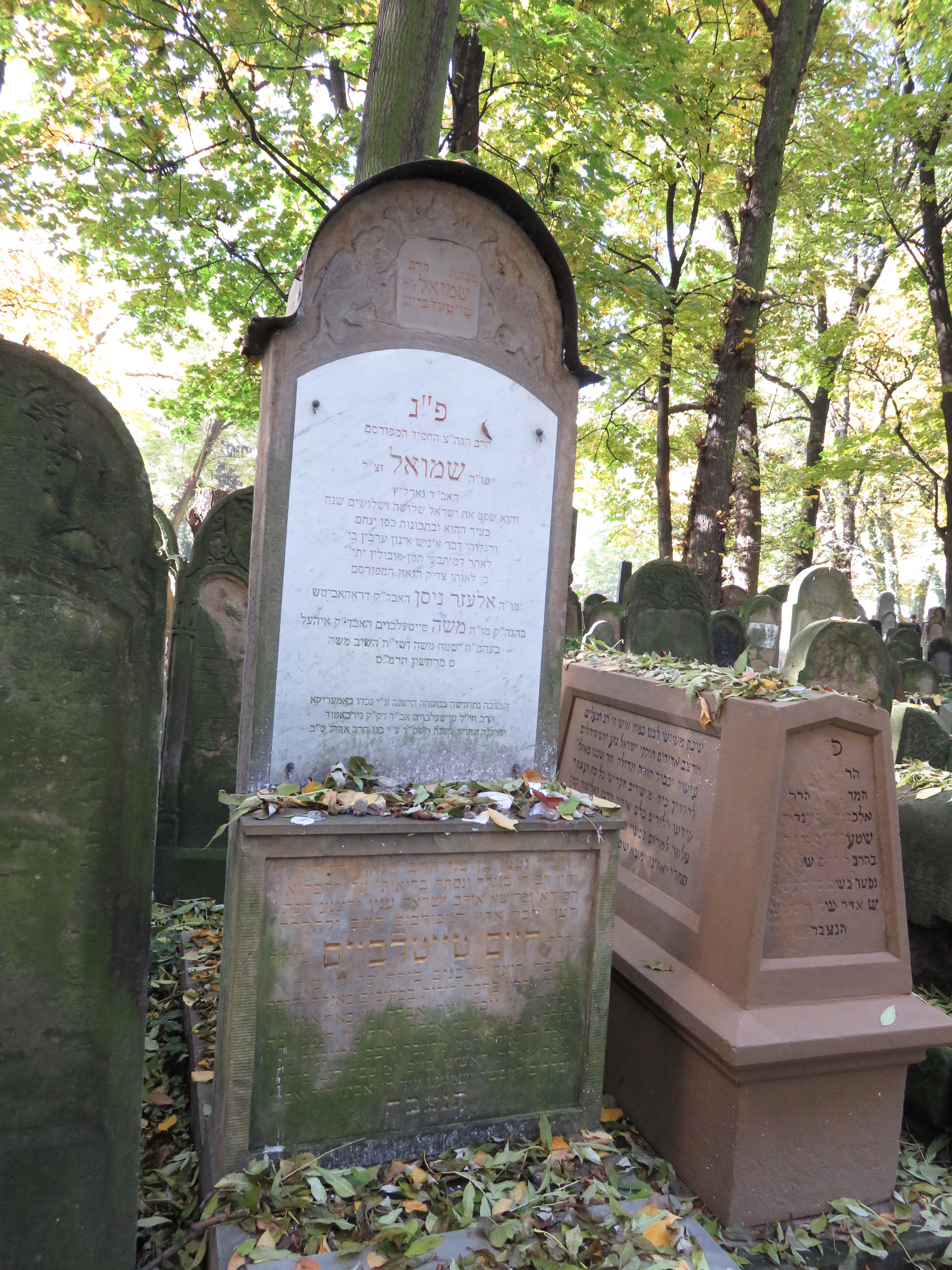 מצבת ר' שמואל טייטלבוים מגורליץ.jpg